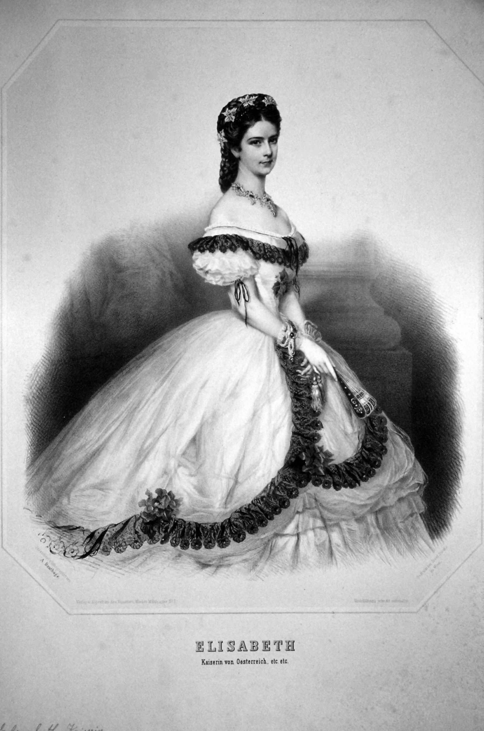 Elisabeth, Kaiserin von Österreich (1837-1898), Königin von Ungarn etc. Lithographie von Adolf Dauthage, ca.1870